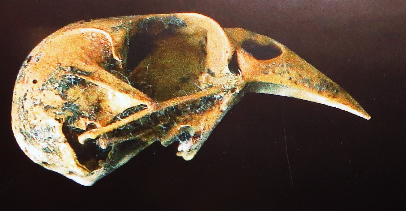 Fossil of Carduelis, an extinct bird- Took the picture at Museo de la Naturaleza y el Hombre - Tenerife